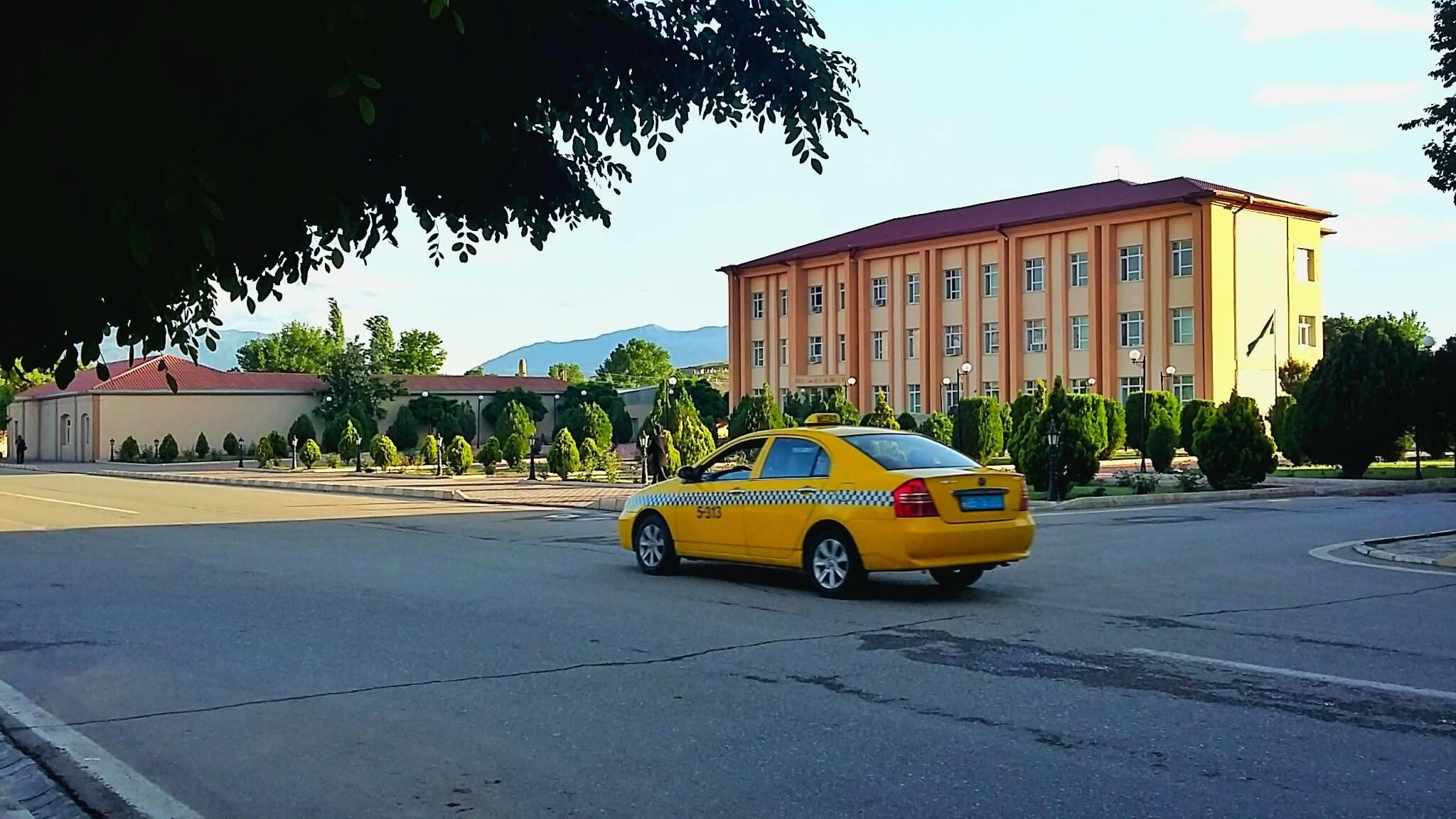 Culfa İcra Hakimiyyəti